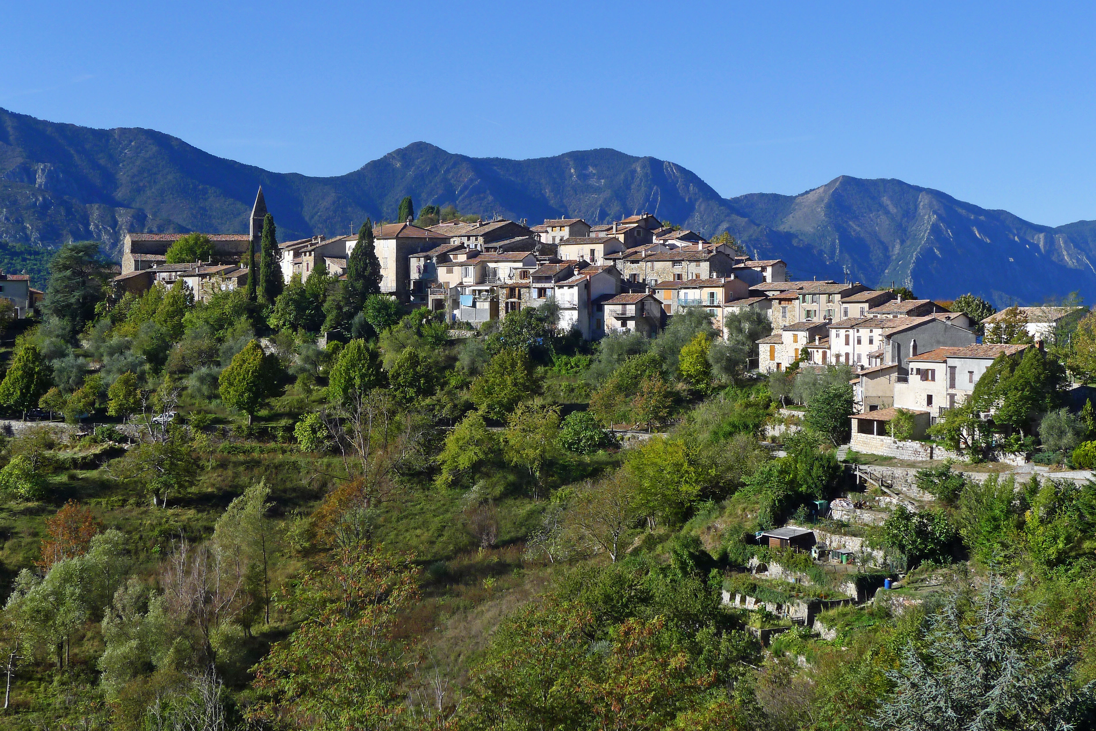 Vue sur le village de La Tour depuis la route des Granges de la Brasque